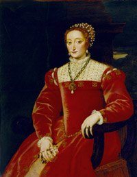 Ritratto di Giulia da Varano della Rovere, olio su tavola, Firenze, Palazzo Pitti, Appartamenti, Sala dei Pappagalli